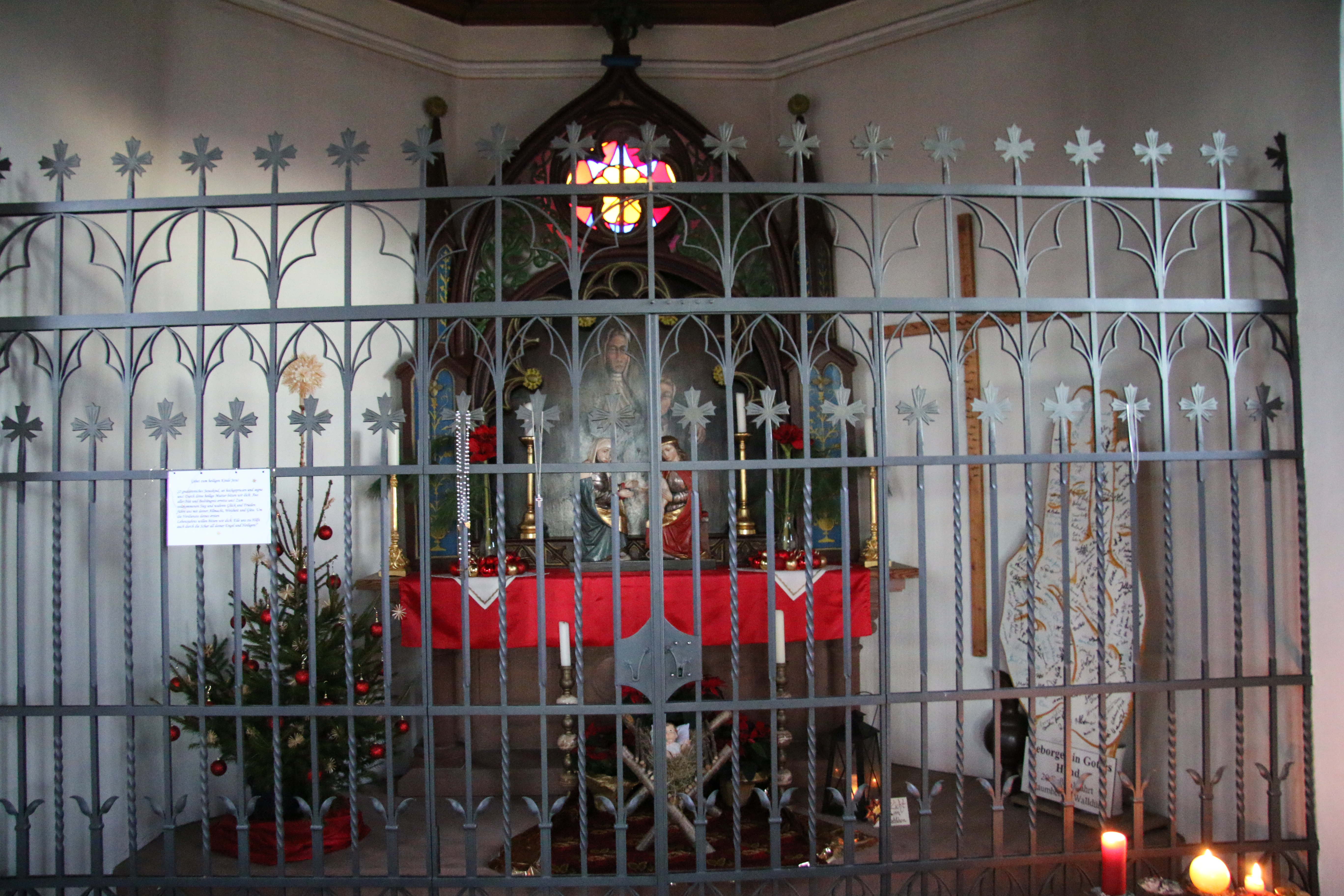 Altar mit Gitter. Im hintergrund ist das prachtvolle Rundfenster zu sehen.